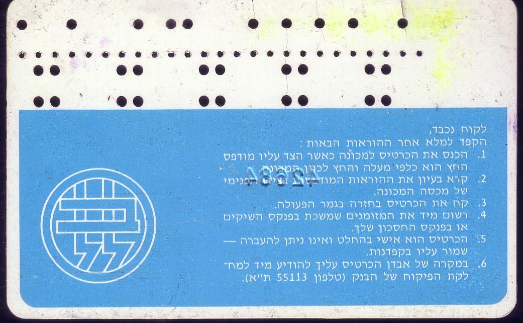 כרטיס כספומט דגם ראשון, כרטיס מנוקב ללא פס מגנטי, צד אחורי